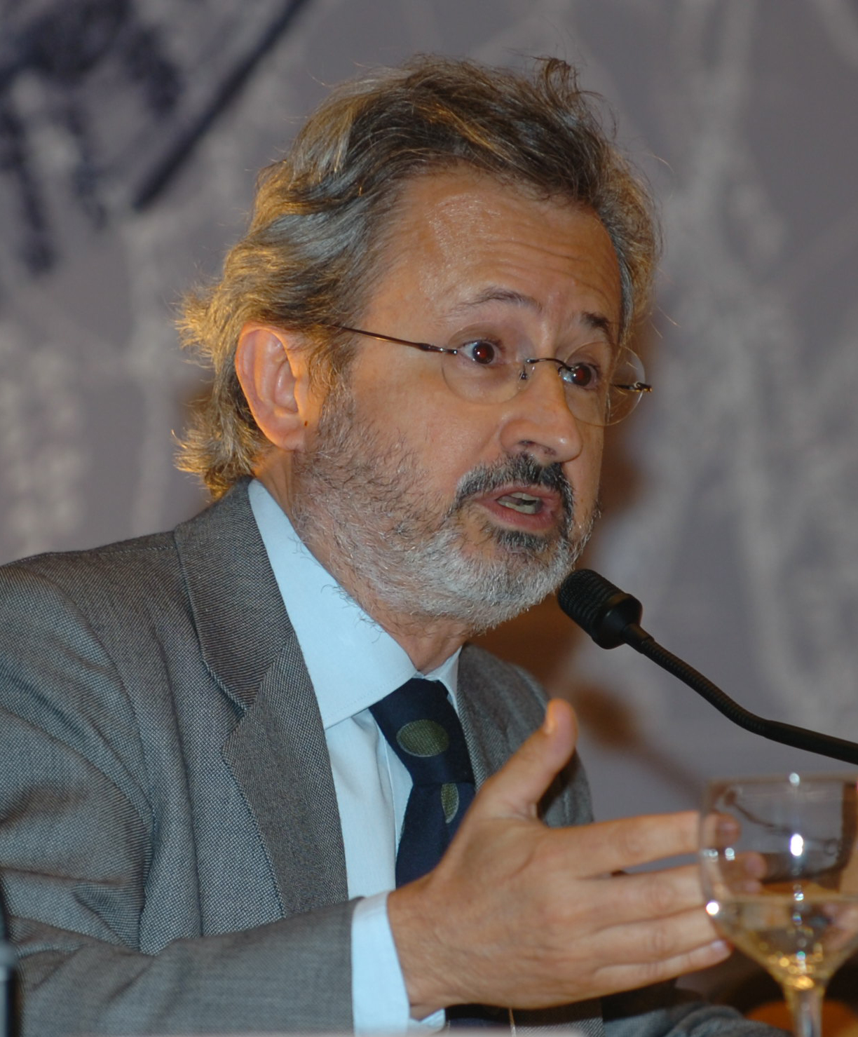 O antropólogo brasileiro, Eduardo Viveiros de Castro, faz a mediação da última conferência do dia no Seminário Internacional de Diversidade Cultural em Brasília.